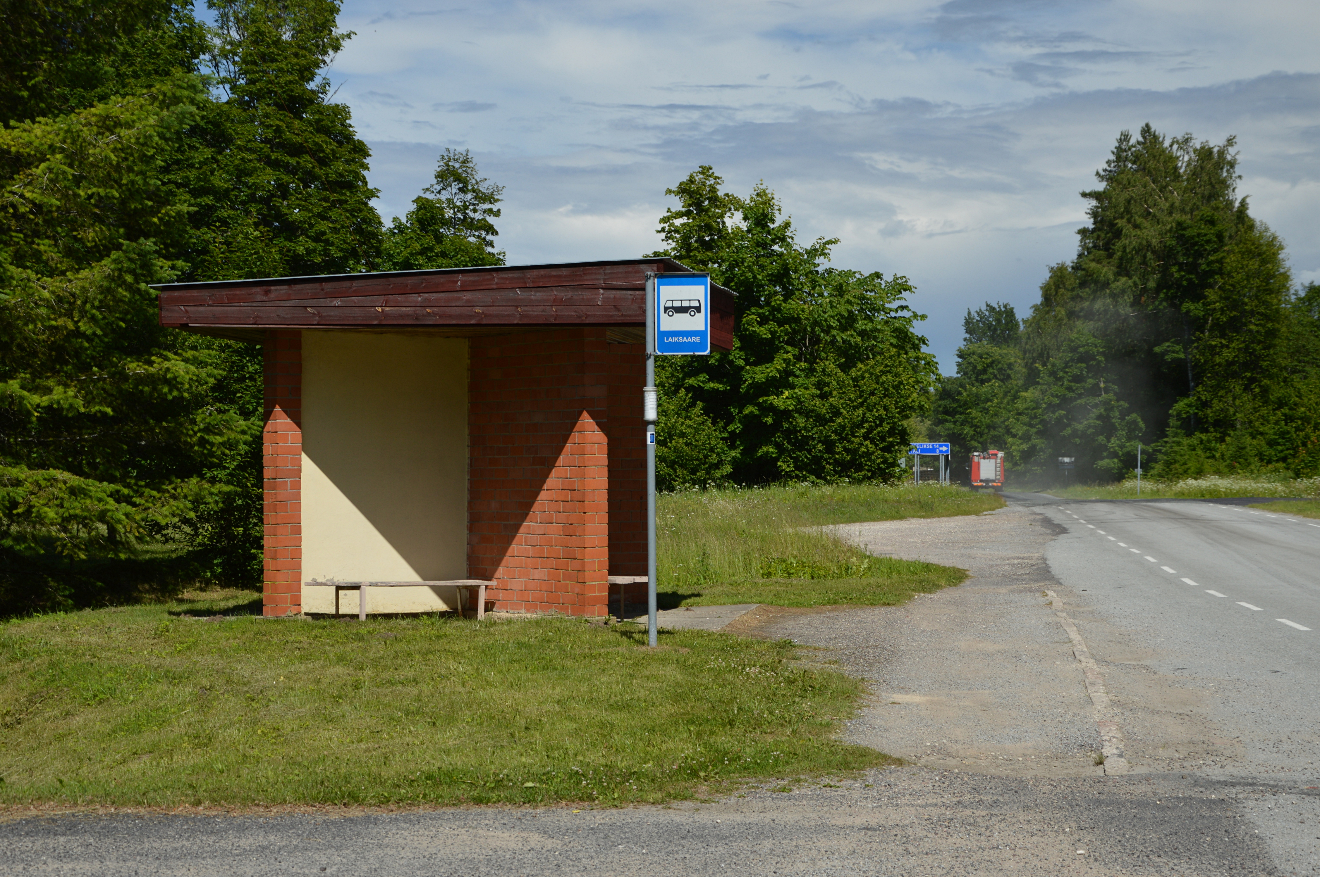 Laiksaare bussipeatus